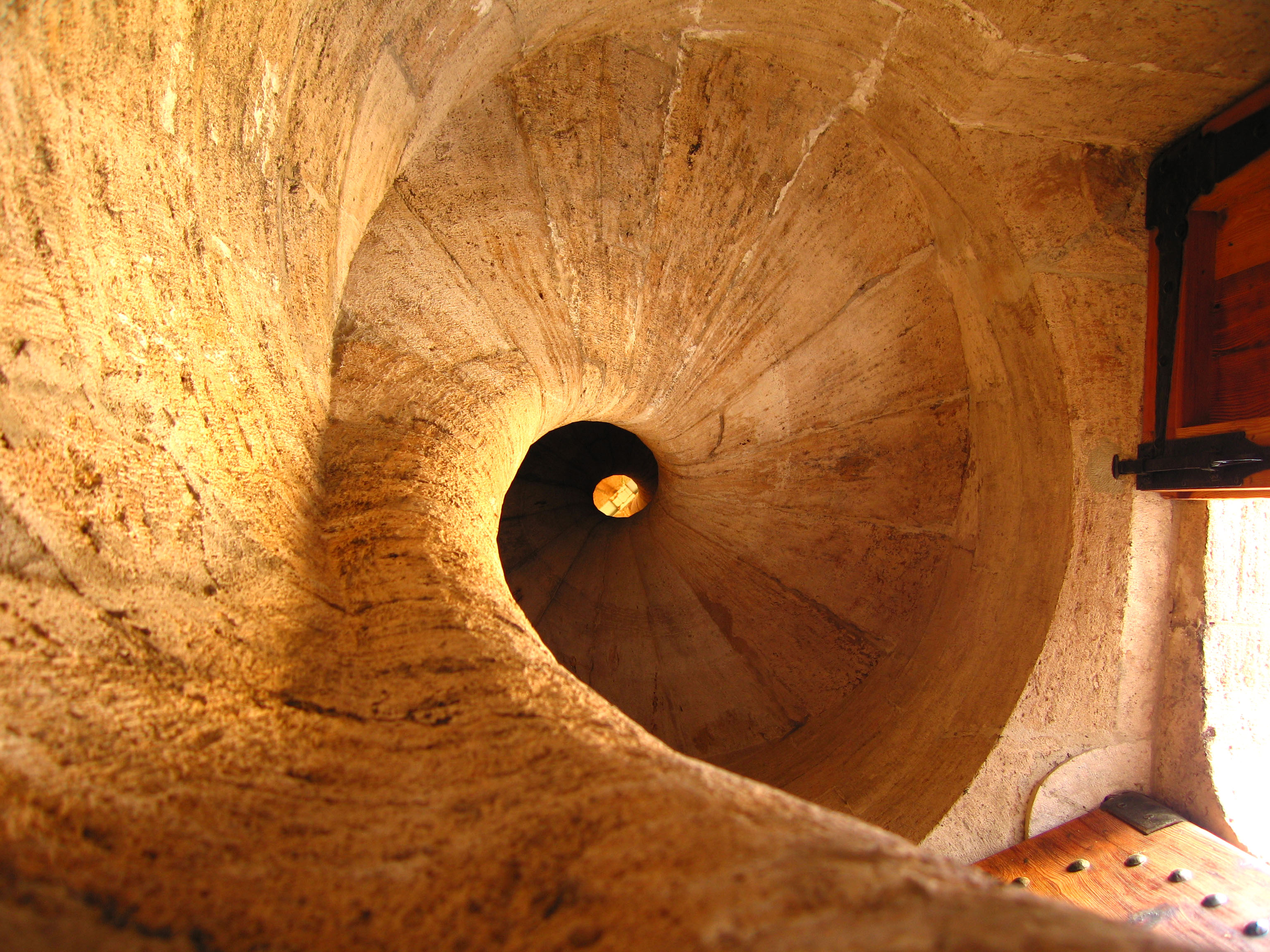 Escala de caragol, Torres de Quart (València)